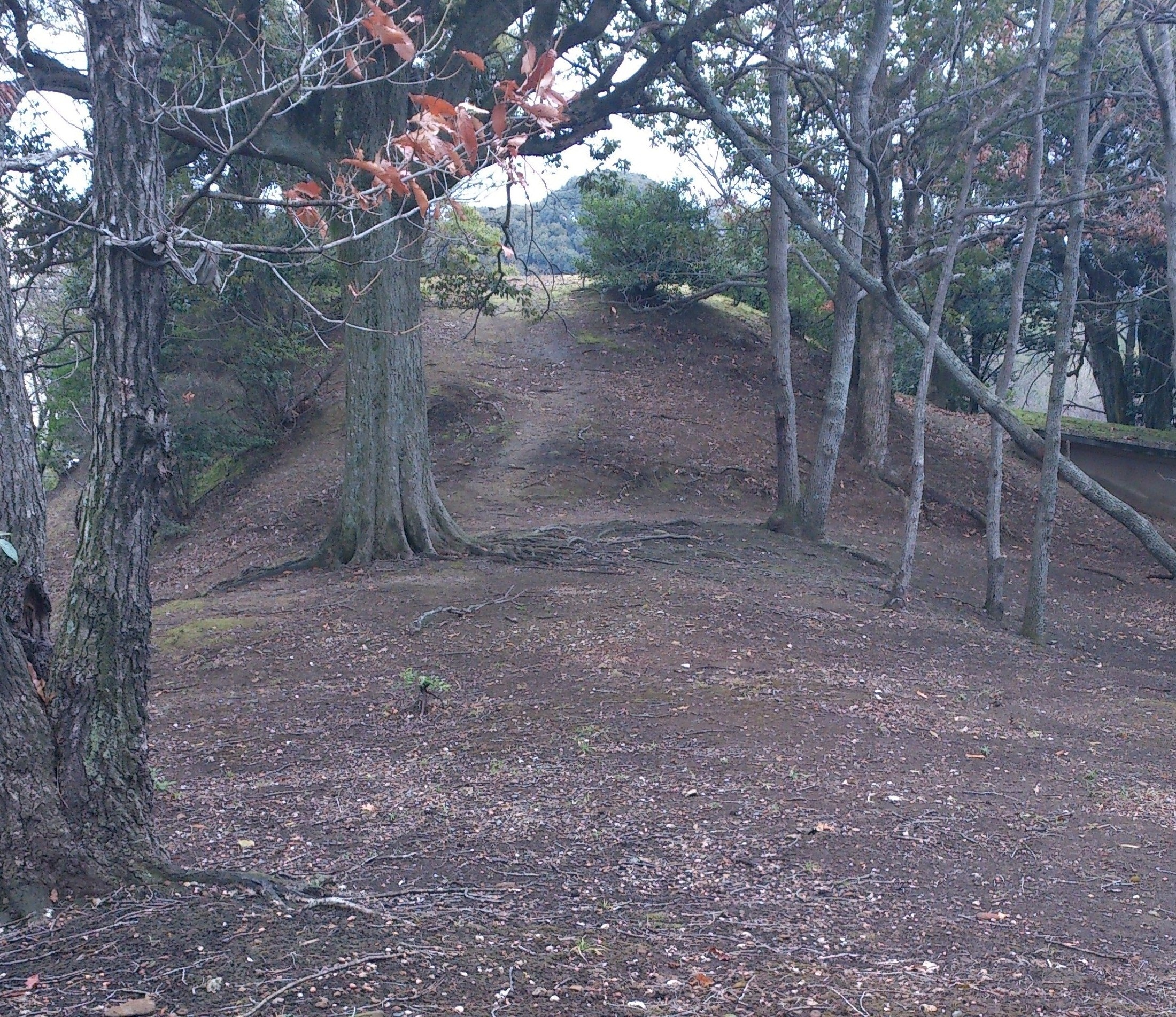 乗場古墳(前方部より撮影)